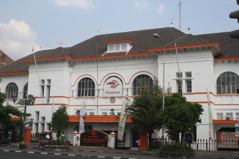 Kantor yang ada di Daerah istimewa Jogyakarta Jawa Tengah Indonesia